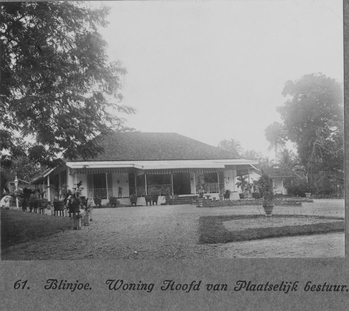 foto. Woning van het hoofd van het plaatselijk bestuur in Belinjoe